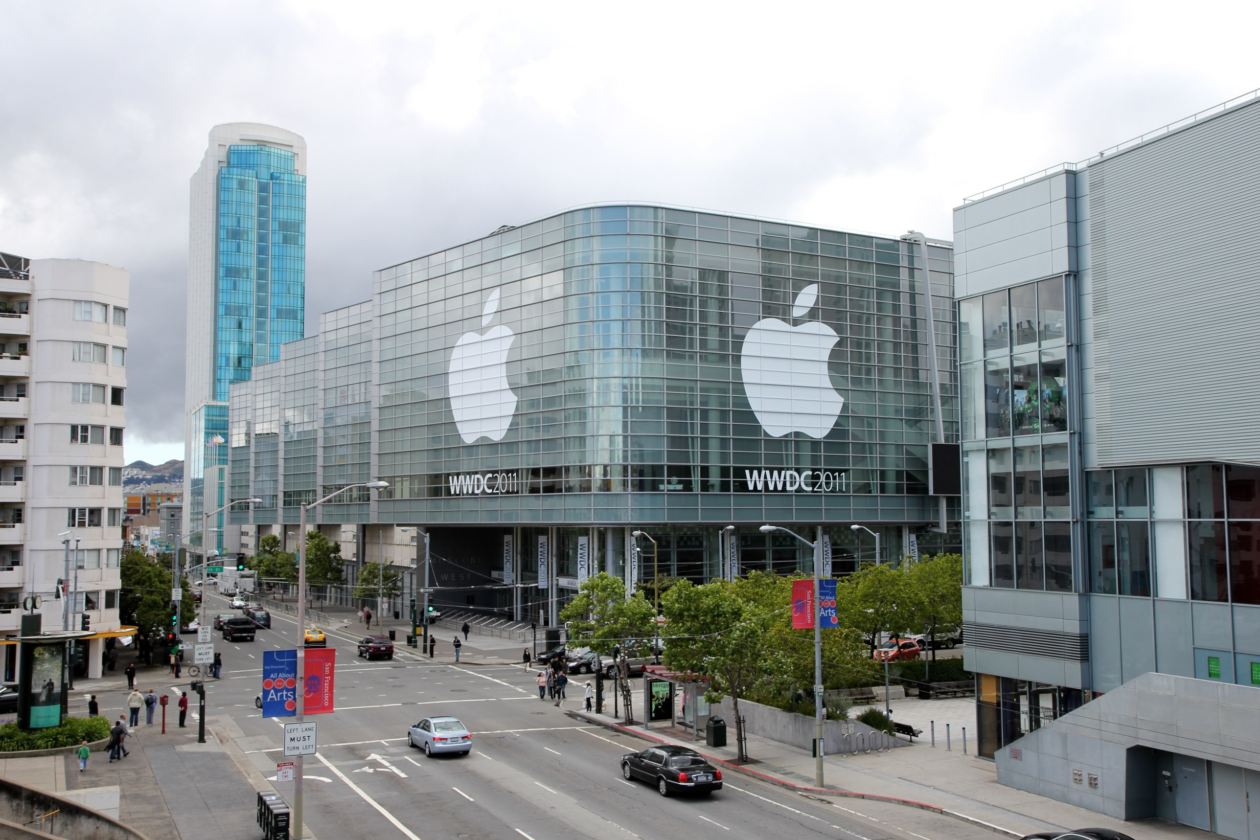 Moscone Center WWDC 2011